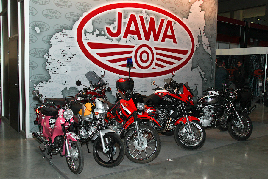 IMG_4403-1.jpg